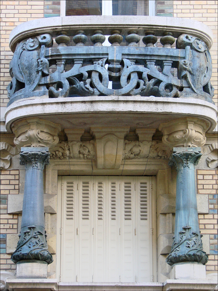 Balcon du 3 square Rapp conçu par Jules Lavirotte dans le style Art Nouveau à Paris